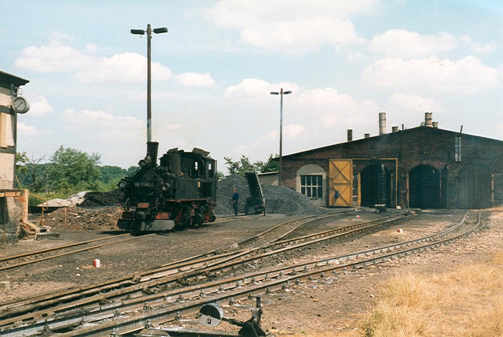 Lokschuppen des Bahnhofs Mügeln mit IV K